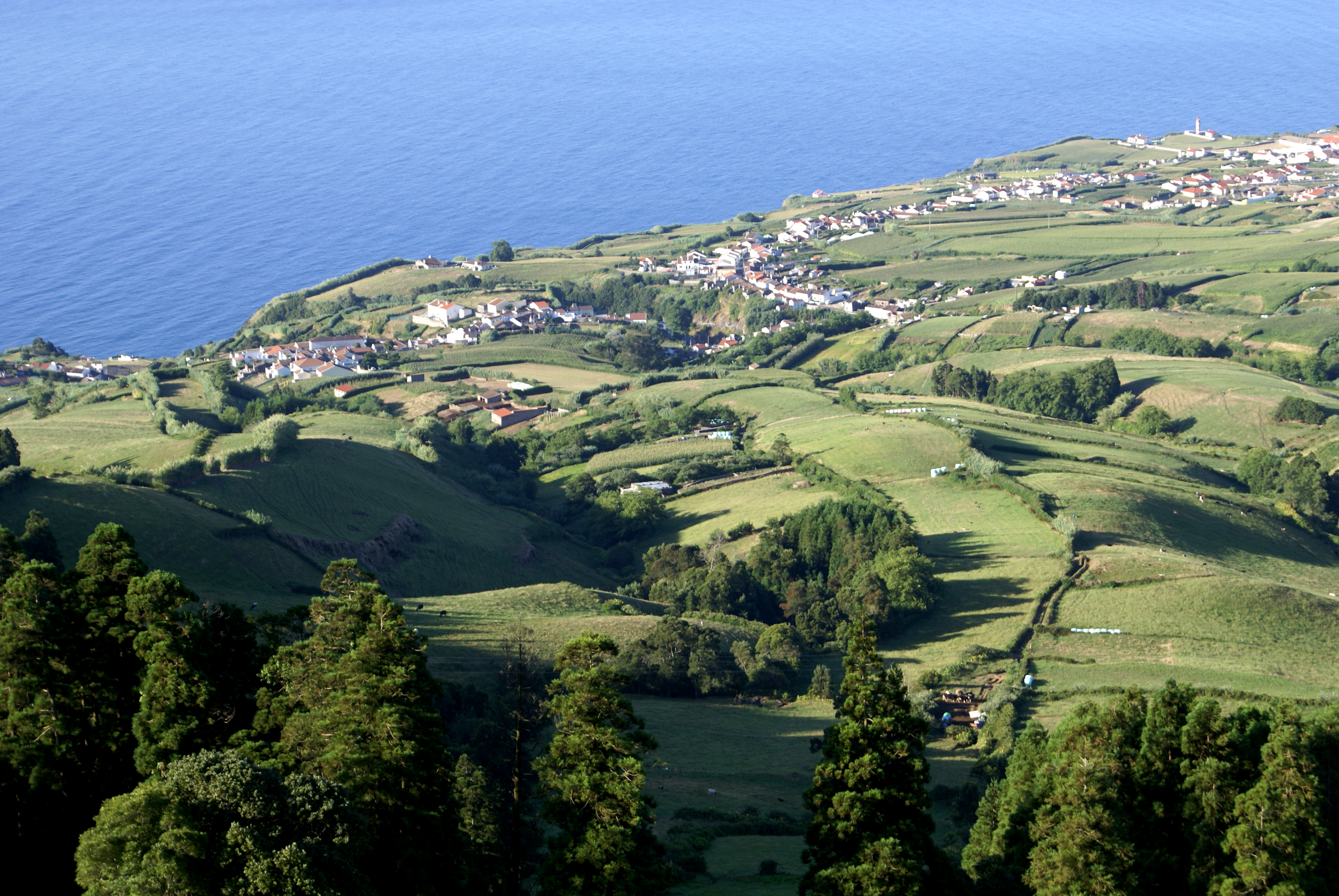 Ponta Garça, Ilha de São Miguel, Açores